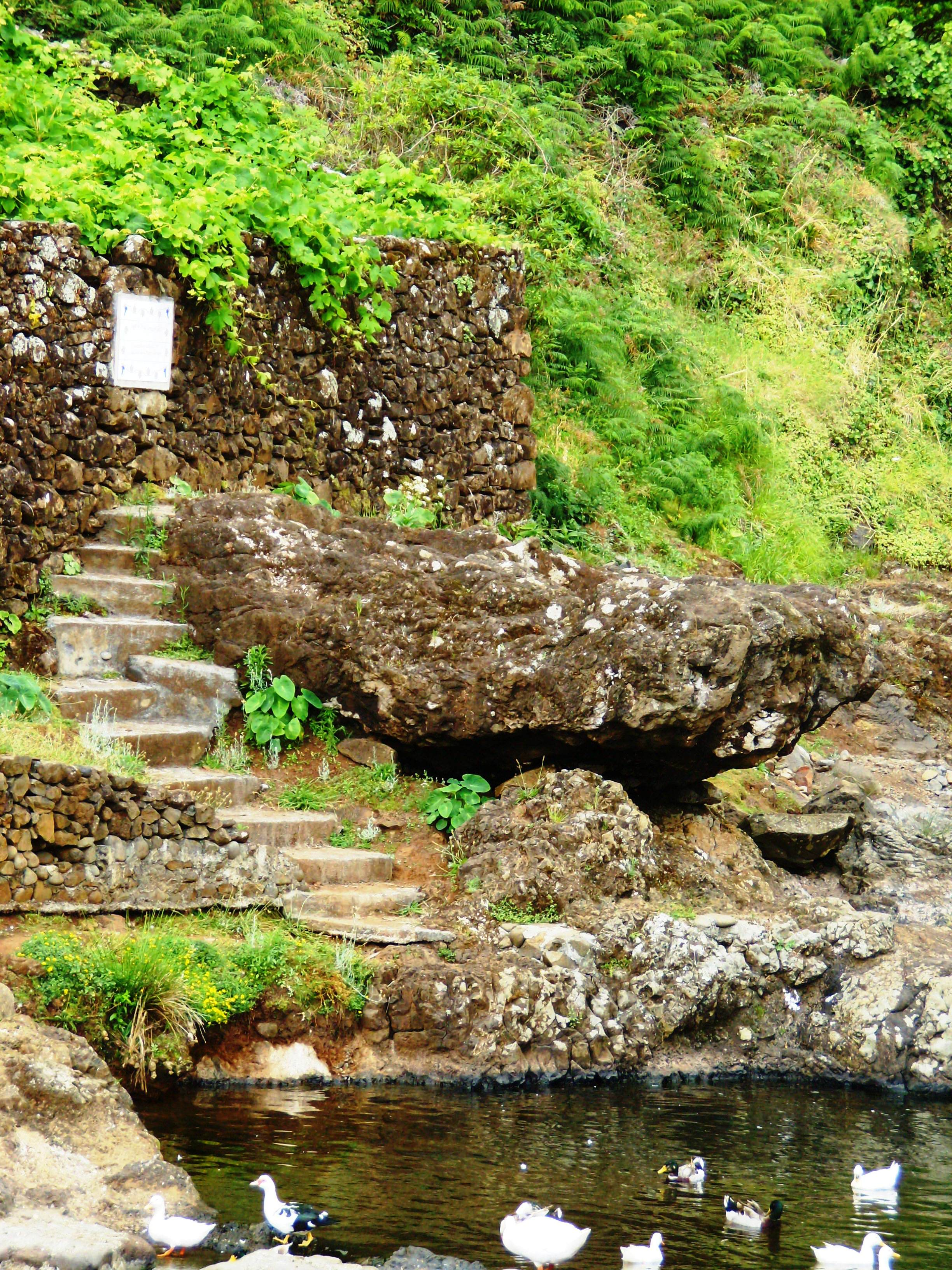 Lagar de Diogo Santos Faleiro, Ilha de Santa Maria (Açores), Portugal.